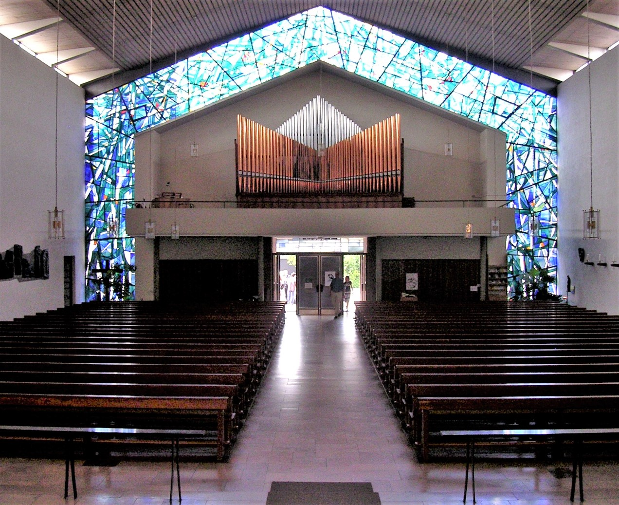 St. Peter und Paul Obernau - Orgelempore, Glasfenster von Prof.Hannes Neuner